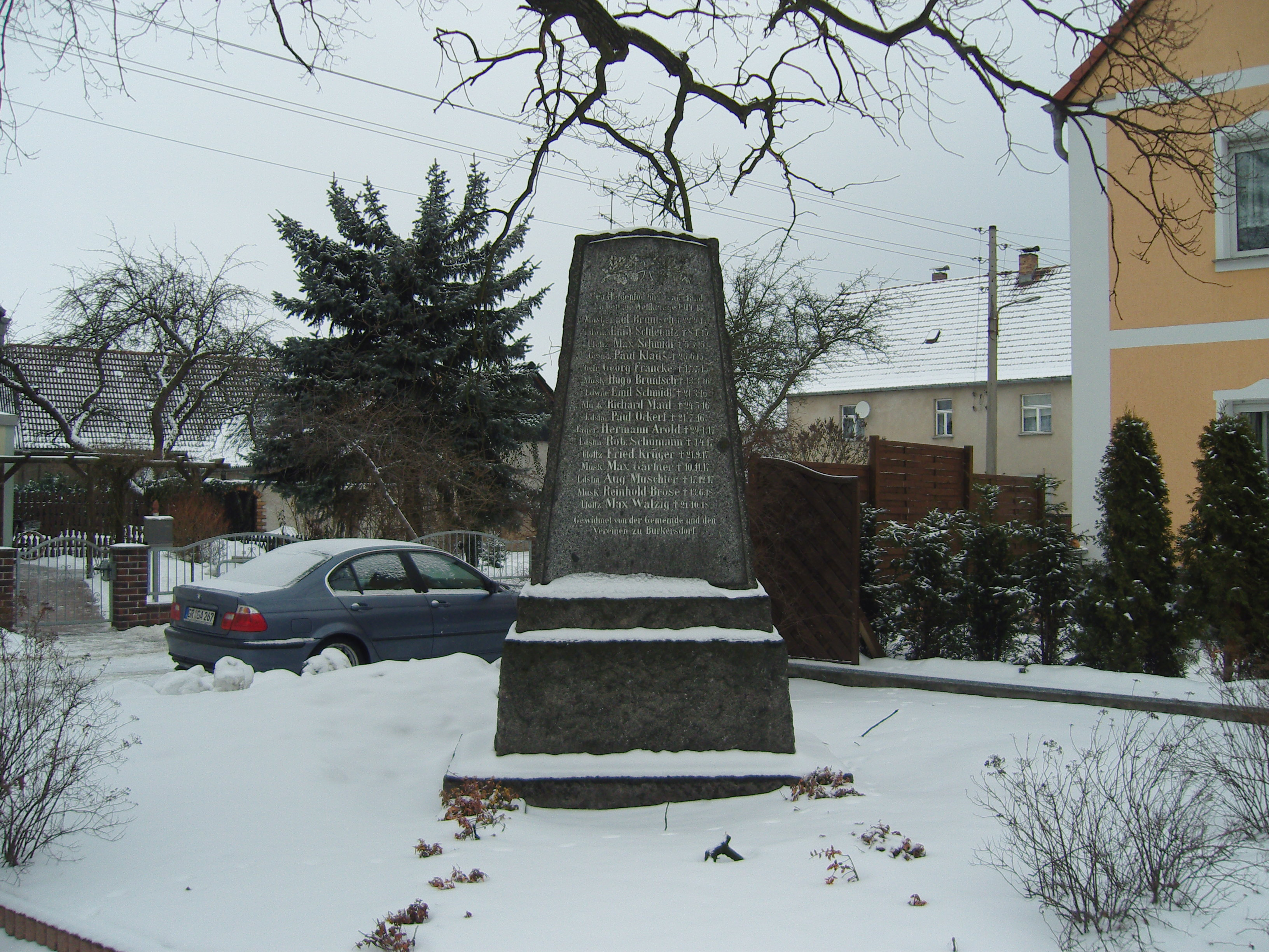 Kriegerdenkmal in Burkersdorf, Stadtteil von Ortrand